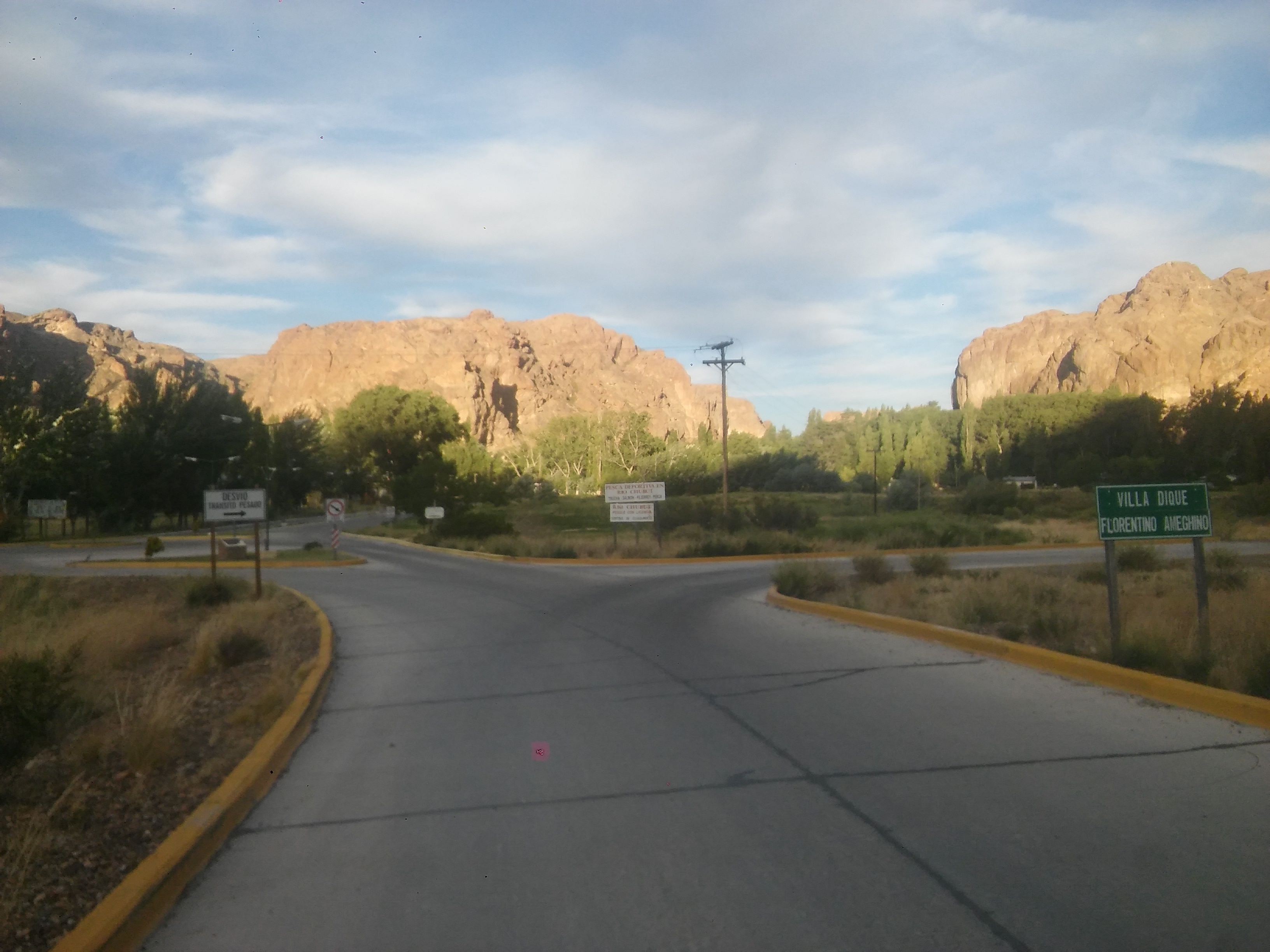 Ingreso al pueblo